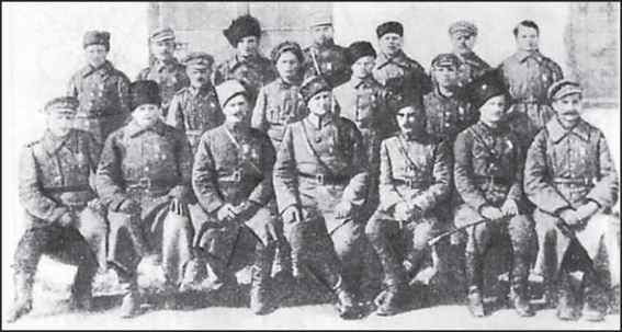 Група учасників Другого Зимового походу в таборі інтернованих у Капіші перед від'їздом в Україну.